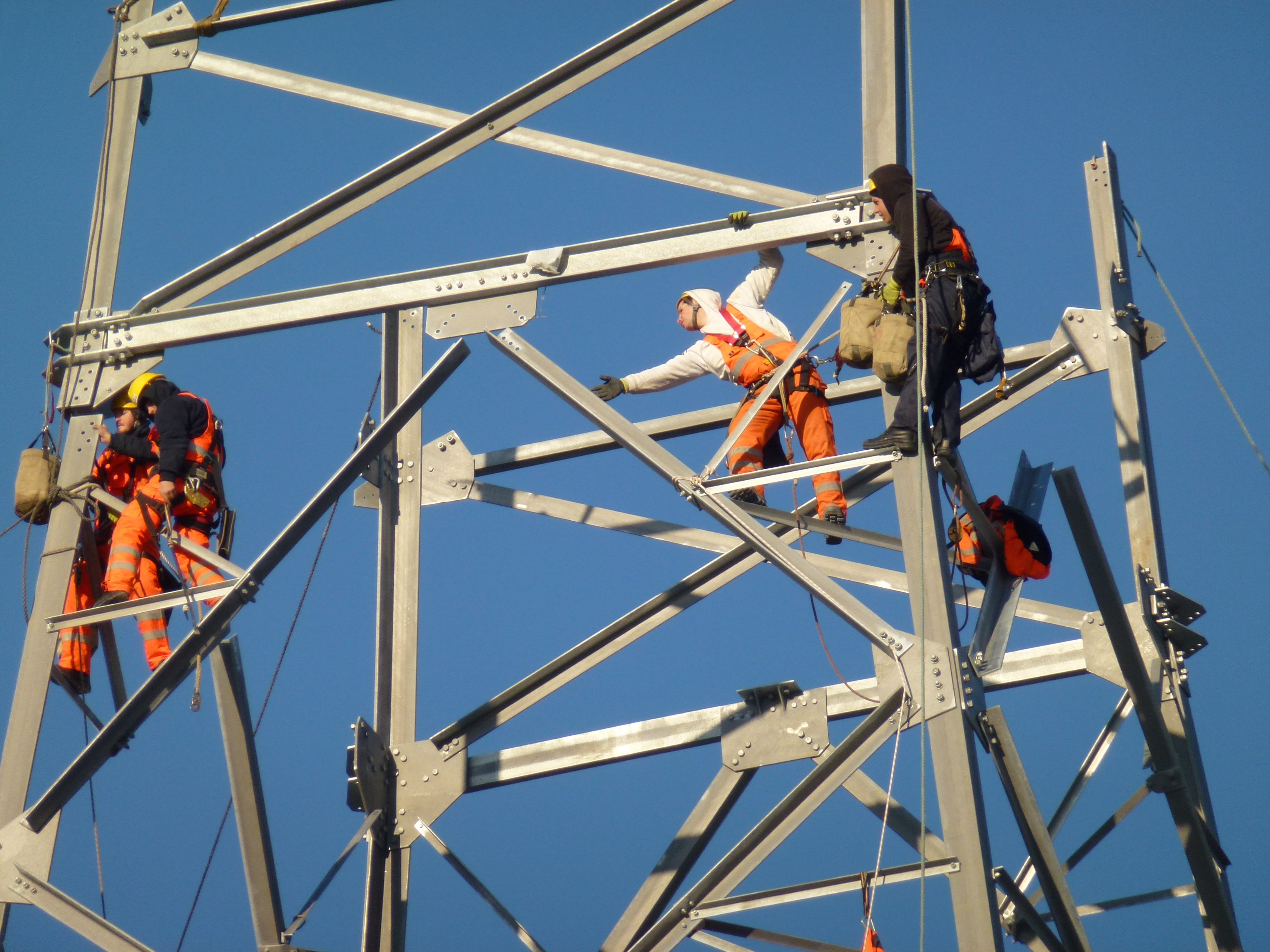 Montage av kraftledningsstolpe vid Lindvreten, Skärholmen